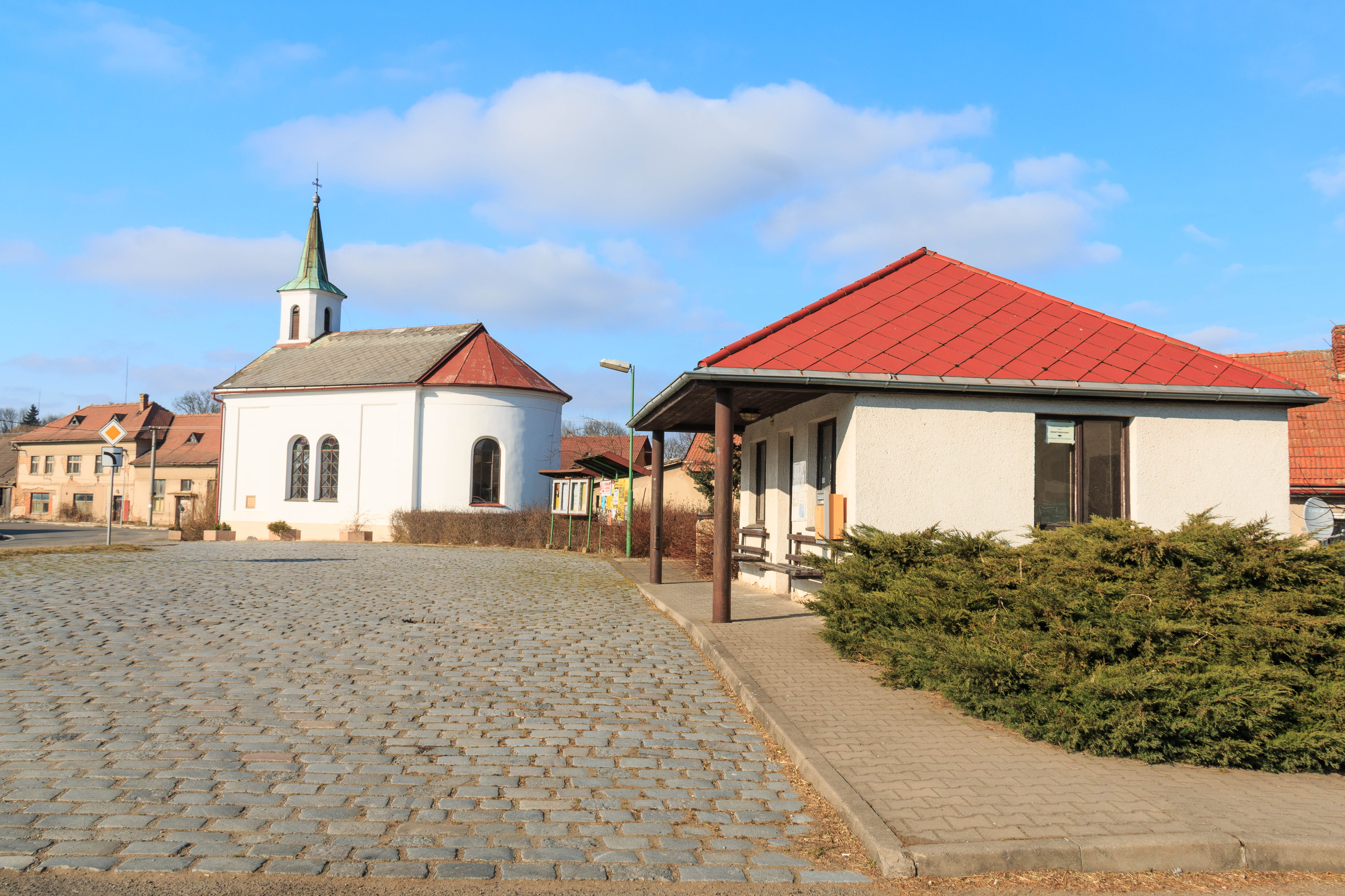 Slavětín nad Metují zastávka